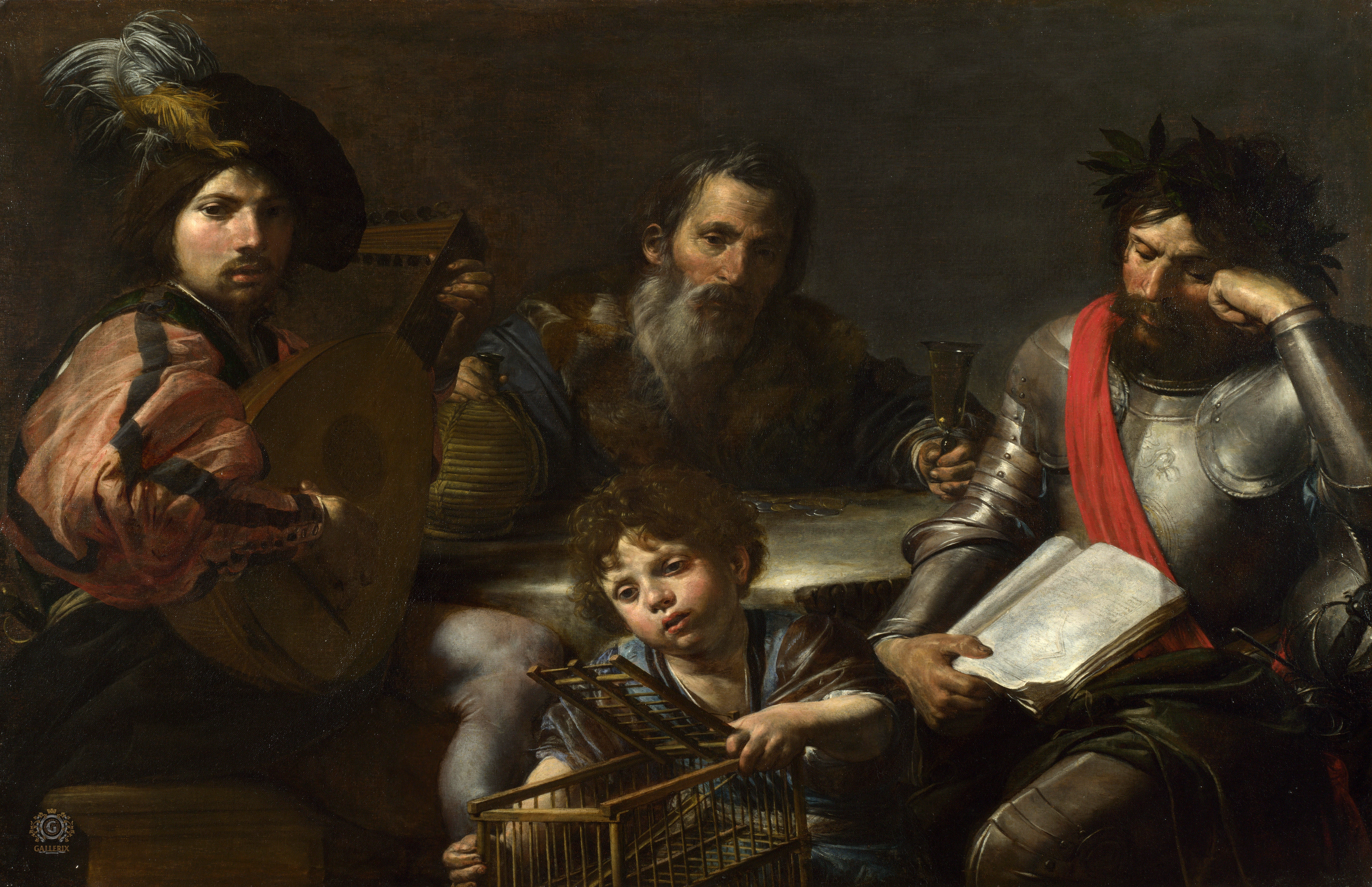 Les quatre âges de l'Homme, huile sur toile, vers 1626, National Gallery, Londres.